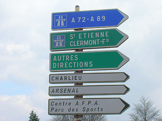 Réseau autoutier à Roanne.